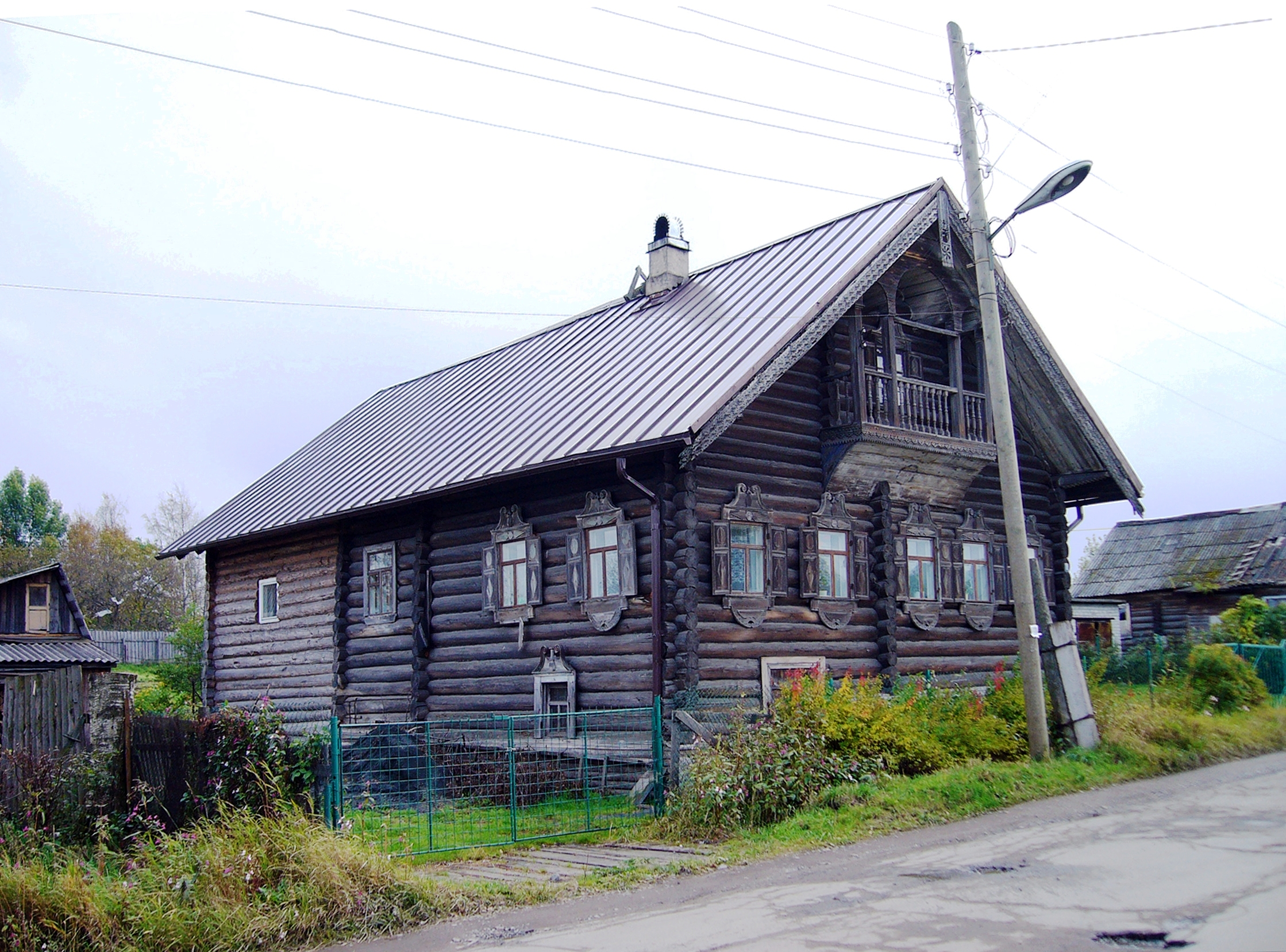 Дом расположен в районе Сулажгора Петрозаводска. Сохранность хорошая. Под балконом в деревянной панели высечено "1879". Фотография: сентябрь 2012 года. Дом жилой.